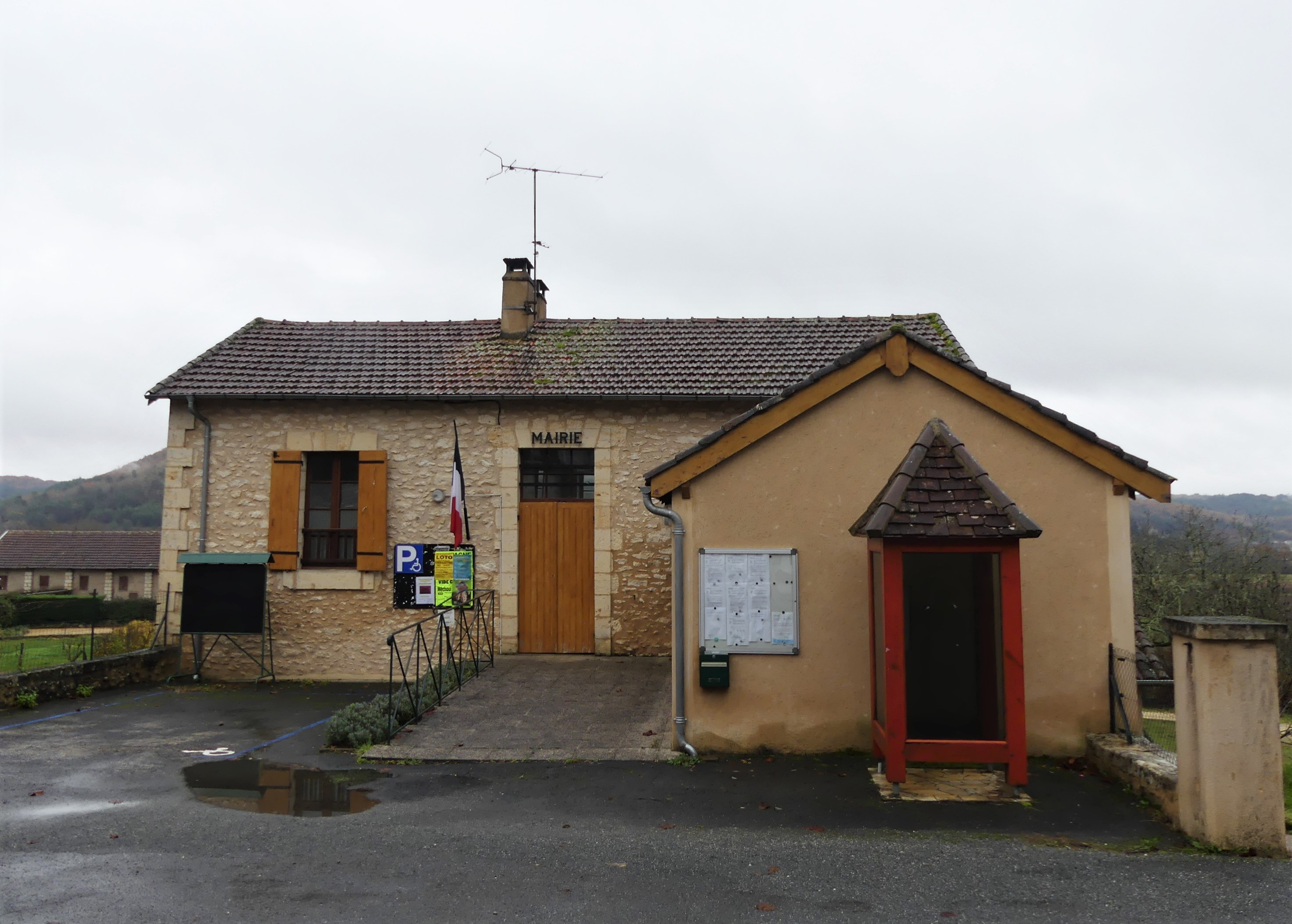 La mairie de Saint-Cirq, Dordogne, France.